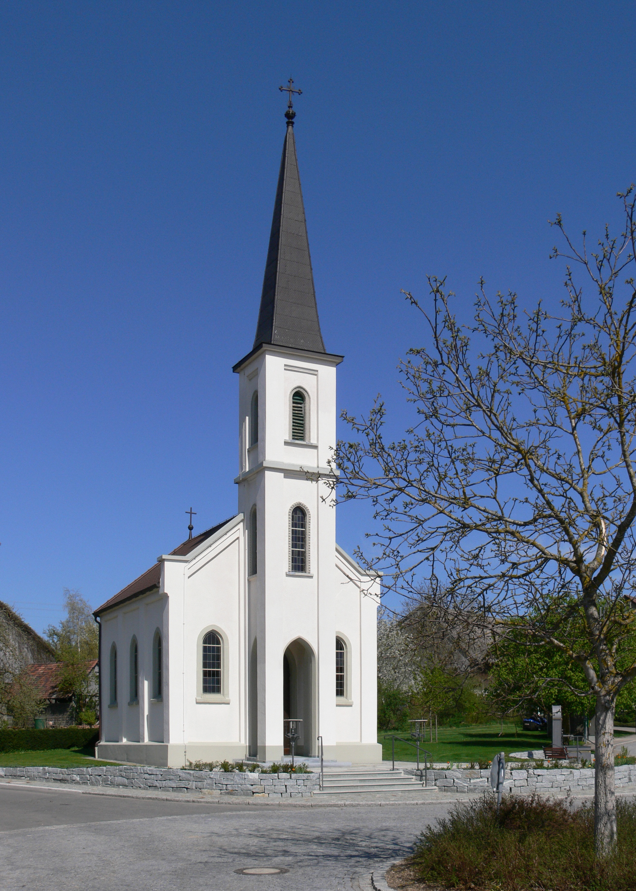 Kapelle "Maria, Mutter der immerwährenden Hilfe" Ruschweiler, Gemeinde Illmensee, Landkreis Sigmaringen (erbaut 1908)